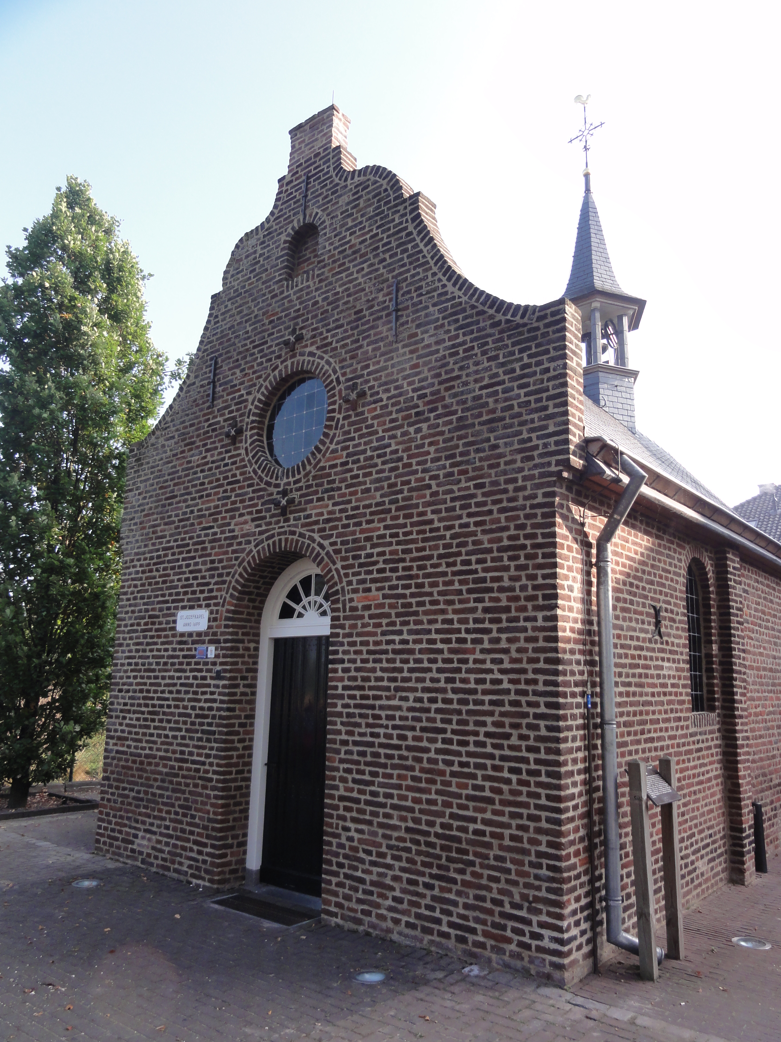 Smakt (Venray) Josefskapel façade